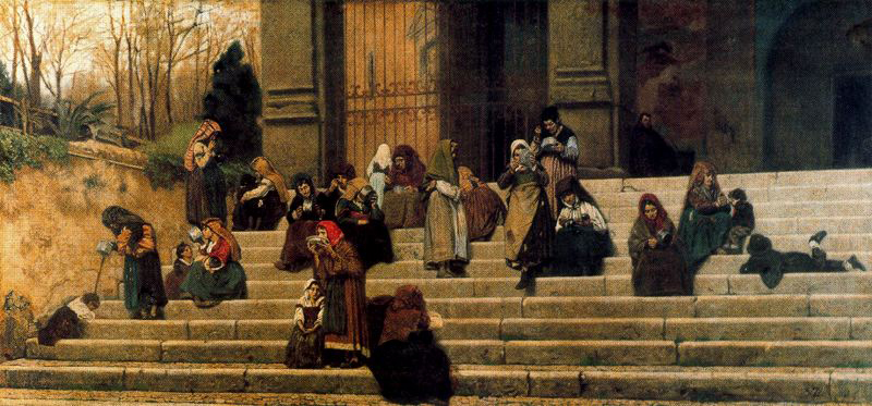 Impressioni di Roma by Federico Zandomeneghi